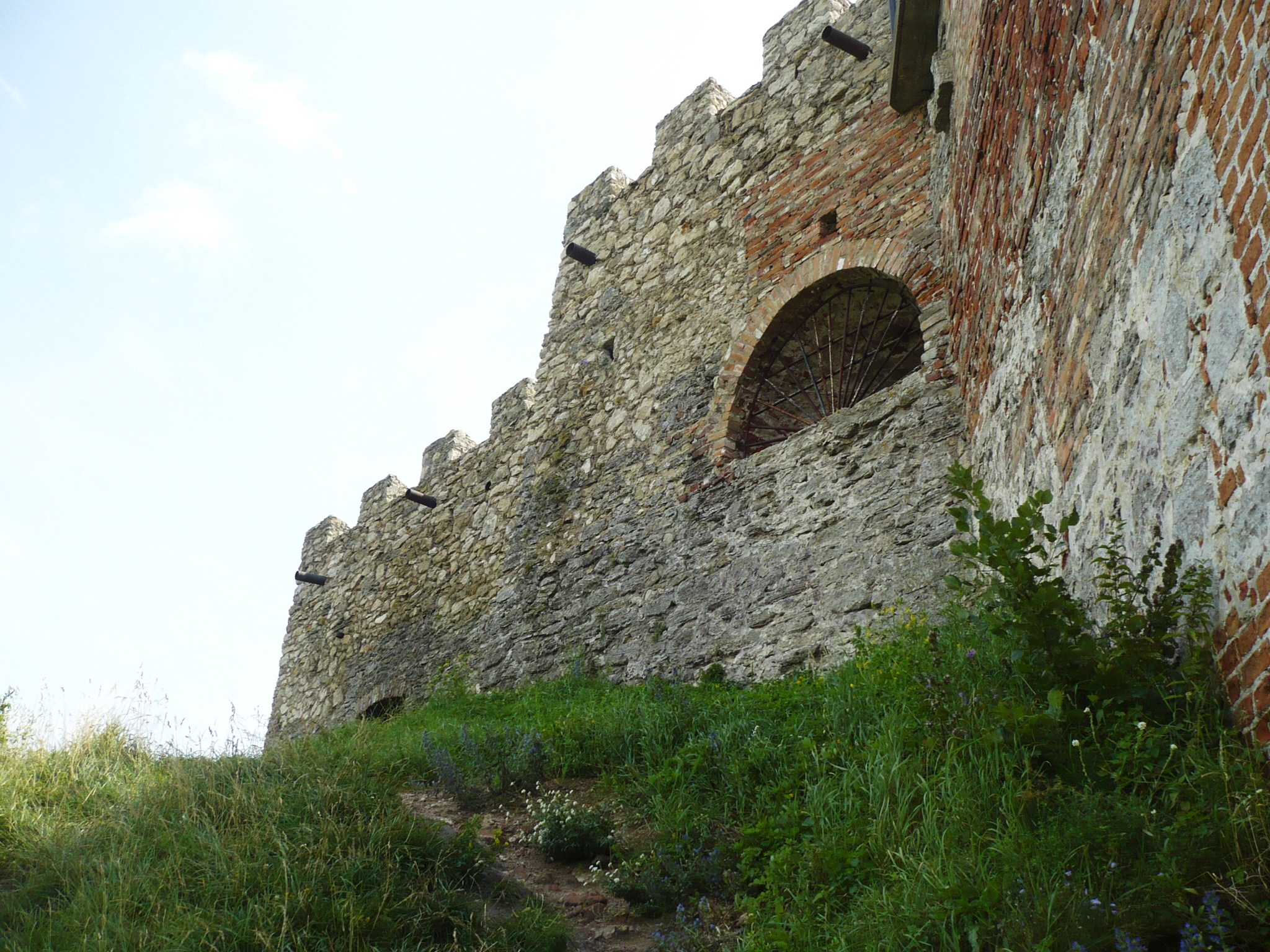 Zamek w Krzemieńcu